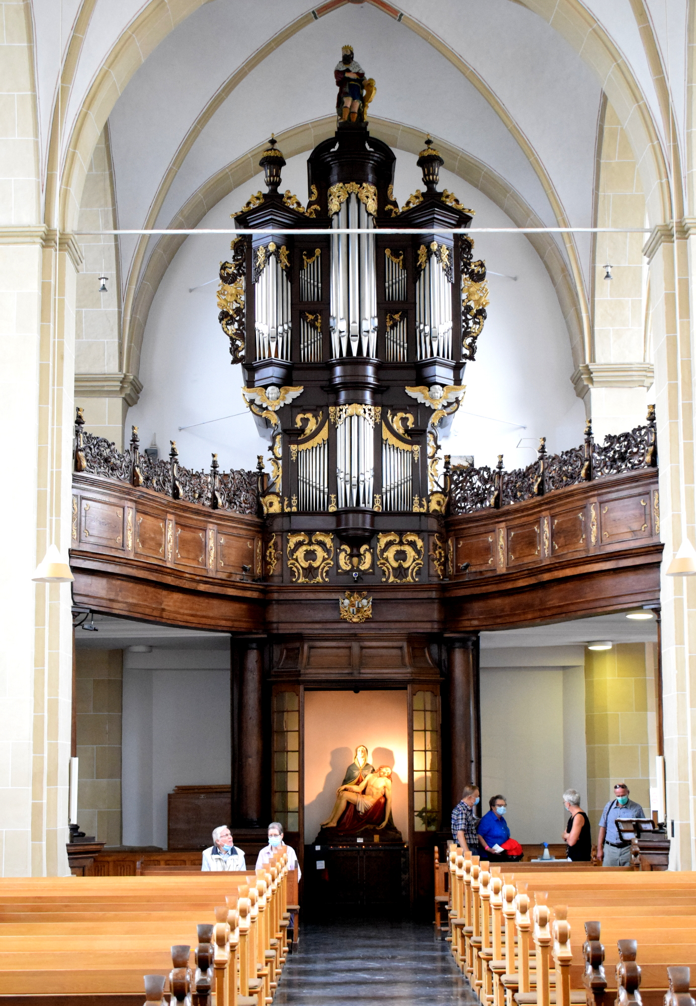 Kamp-Lintfort, kleastertsjerke, oargel